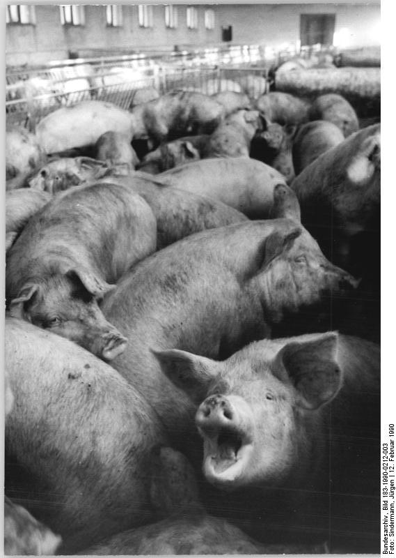 Zurow, Blick in einen Laufstall ADN-ZB Sindermann 12.2.90-pst Bez.Rostock:Schlachtvieh-Überhang-"Schwein" hatten bisher diese Mastschweine der LPG (T) Zurow, Landkreis Wismar.Seit Dezember 1989 warten sie in überfüllten Boxen auf den Fleischer, da die Schlachtkapazitäten fehlen. Die Zurower LPG muß für den Schweine-Überhang täglich rund 2, 5 Tonnen Futter aufwenden, die schon längst vertraglich gebunden waren. Im Januar verendeten hier 30 Mastschweine durch Streß in den überfüllten Anlagen. siehe auch 1990-0212-4N."